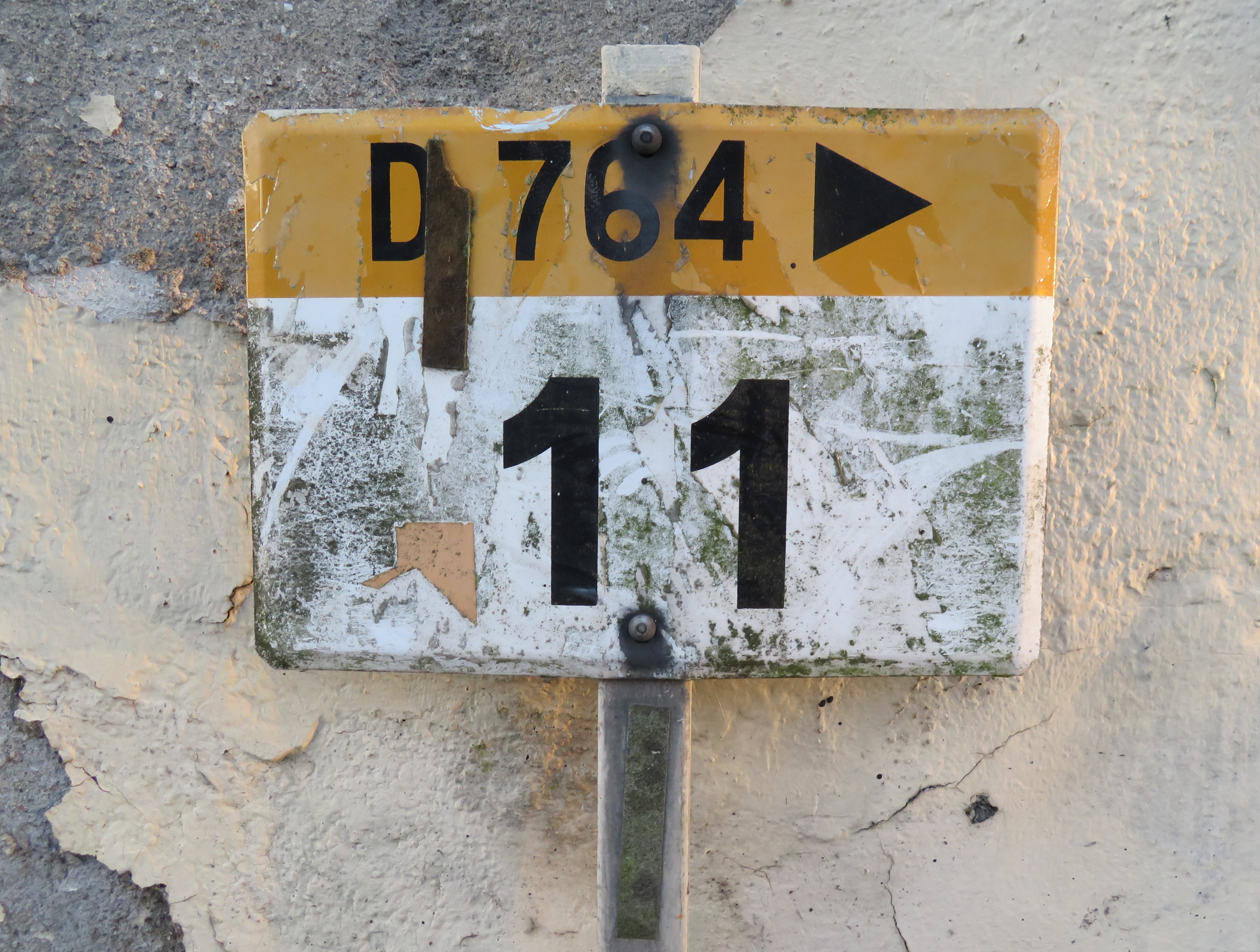 Panneau kilométrique à Peillac (Opération Libre 2017).